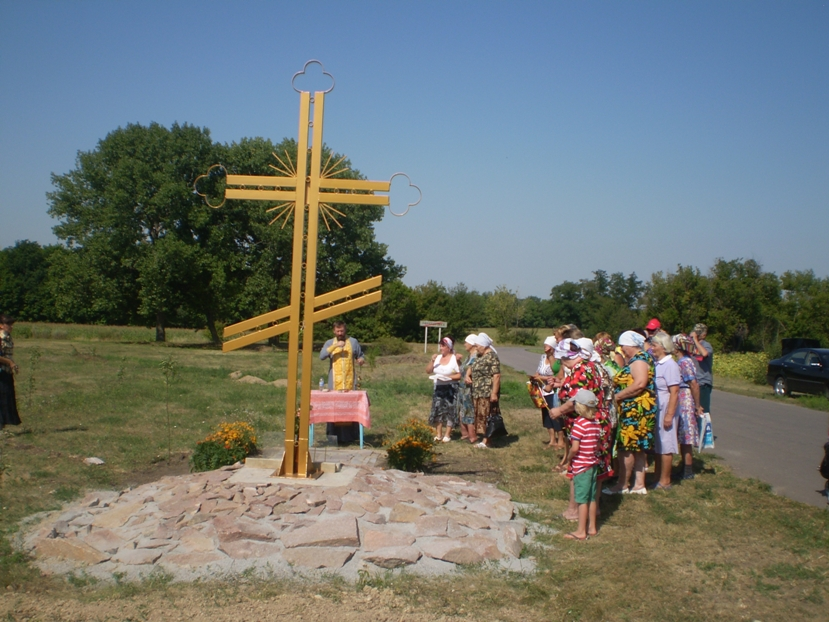 Оберіг села